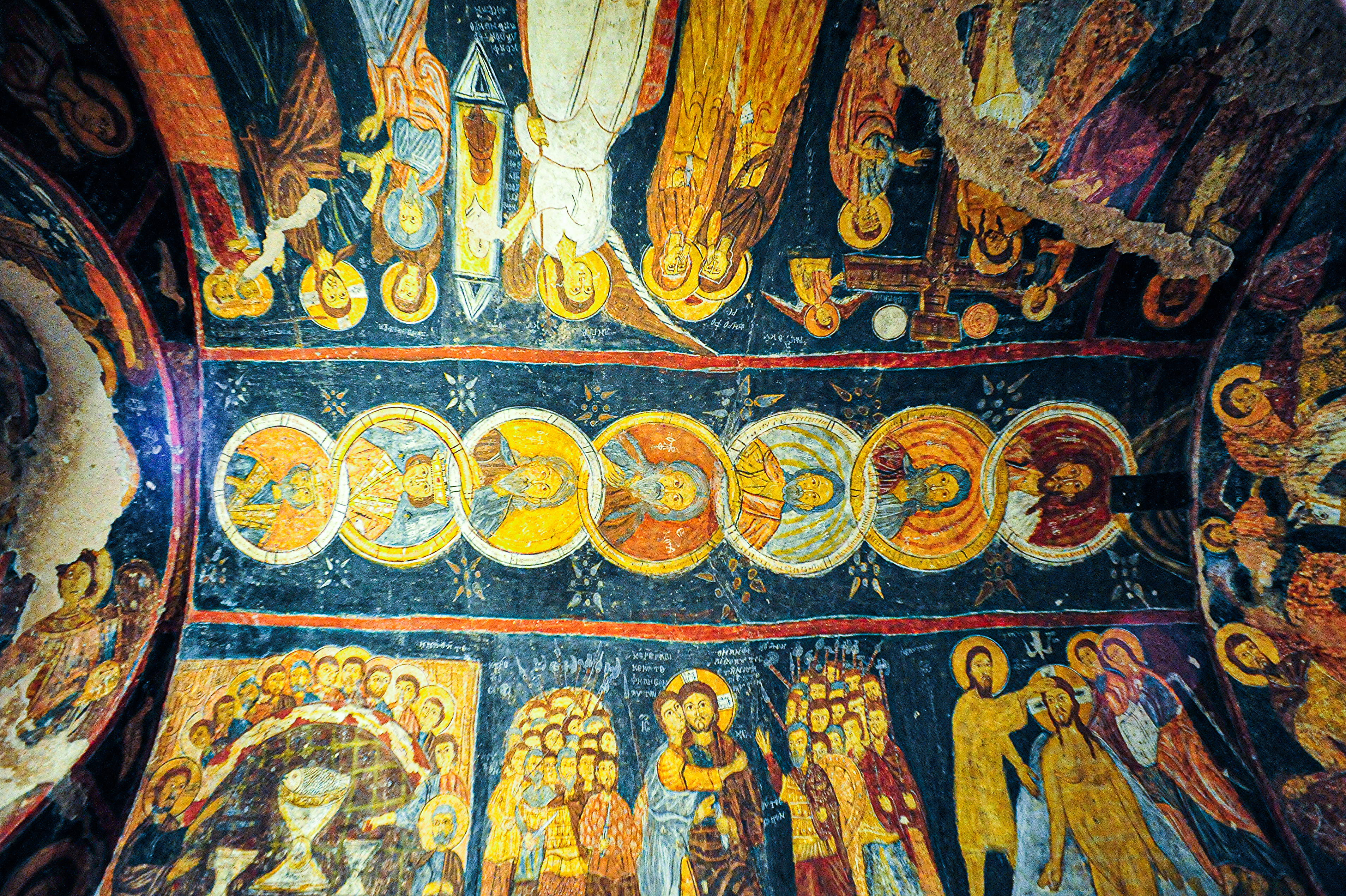 Gülşehir: Karşı Kilise (St. John Church), Cappadocia (Kapadokya, Turkey) 170